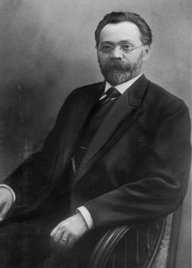 ד"ר צ'לינוב.